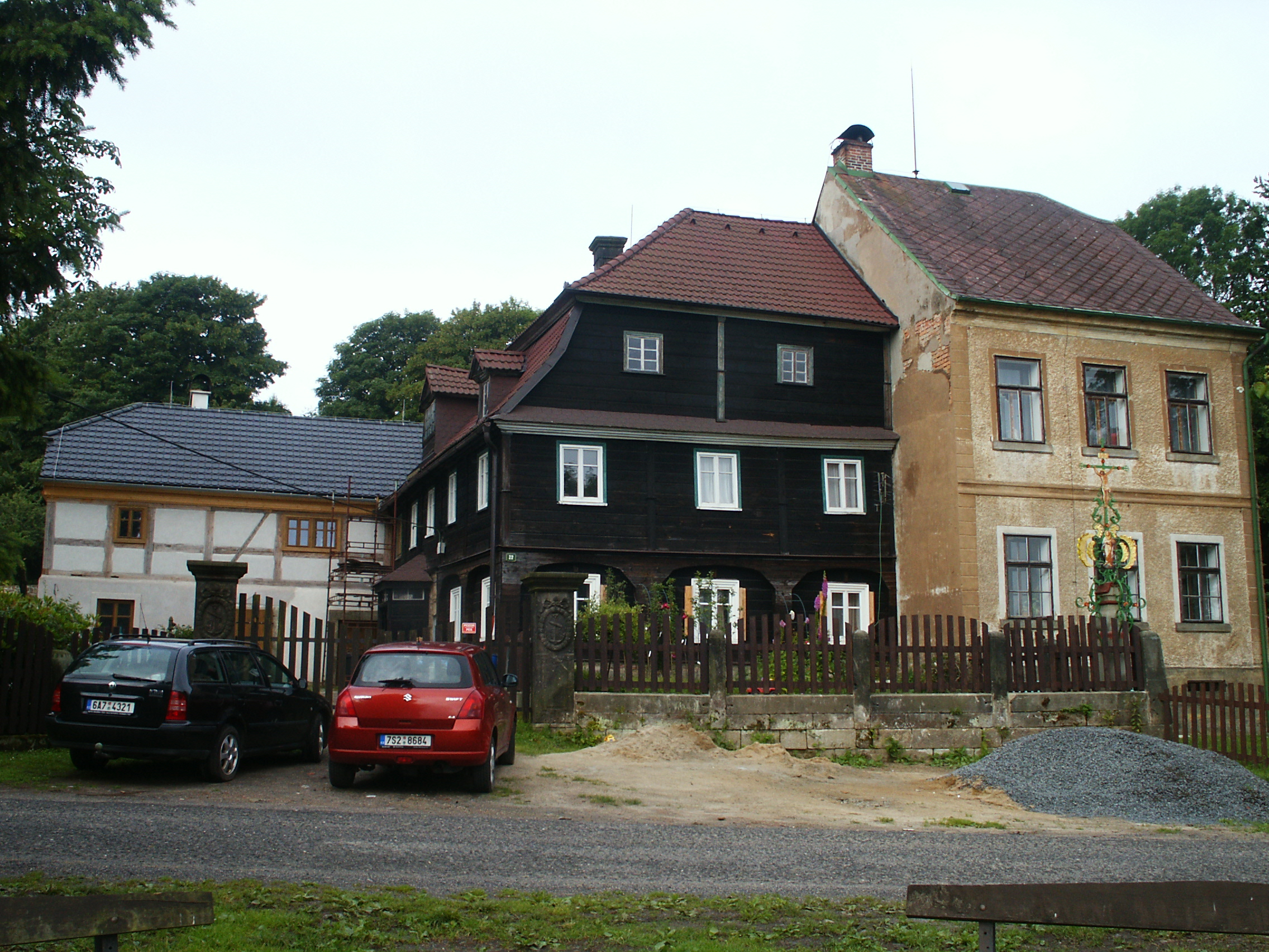 Kamenná Horka - č.p. 22. Hrázděný, podsádkový a zděný dům; v popředí Köglerův kříž.